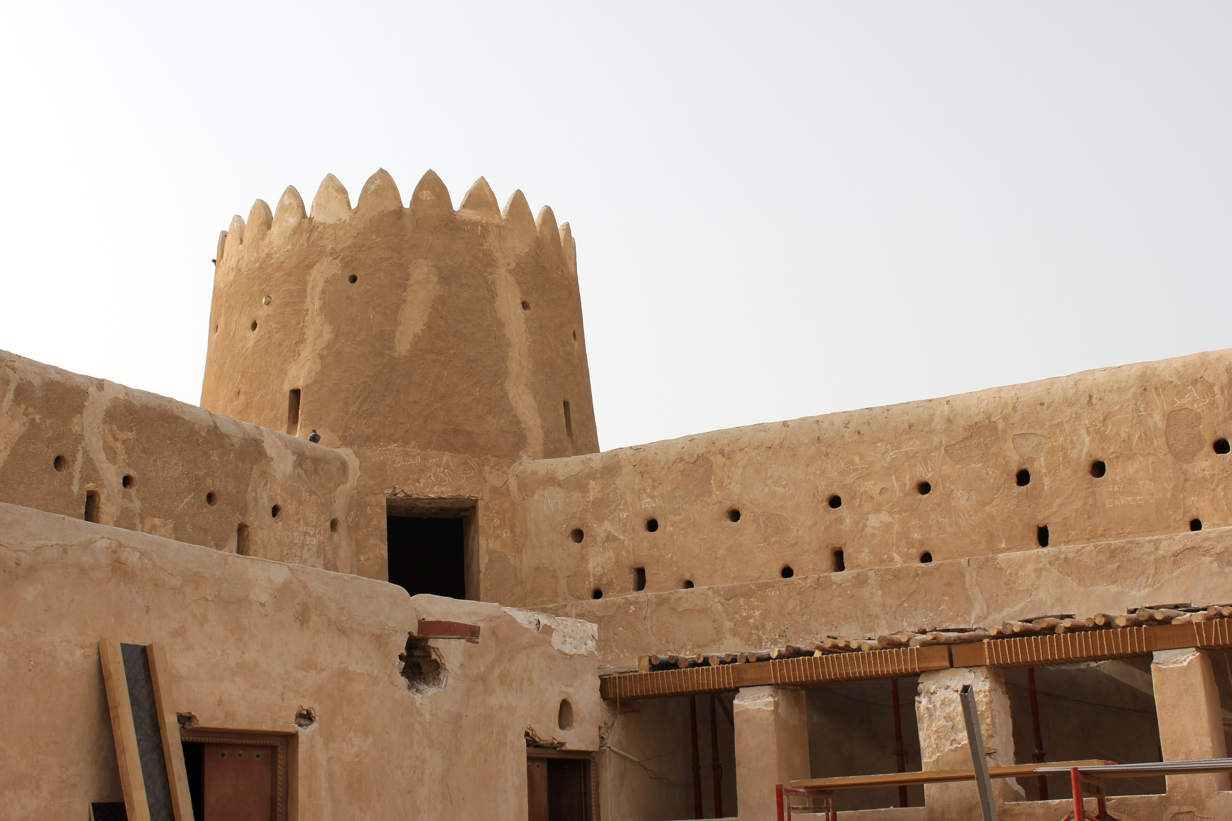 Al Zubara